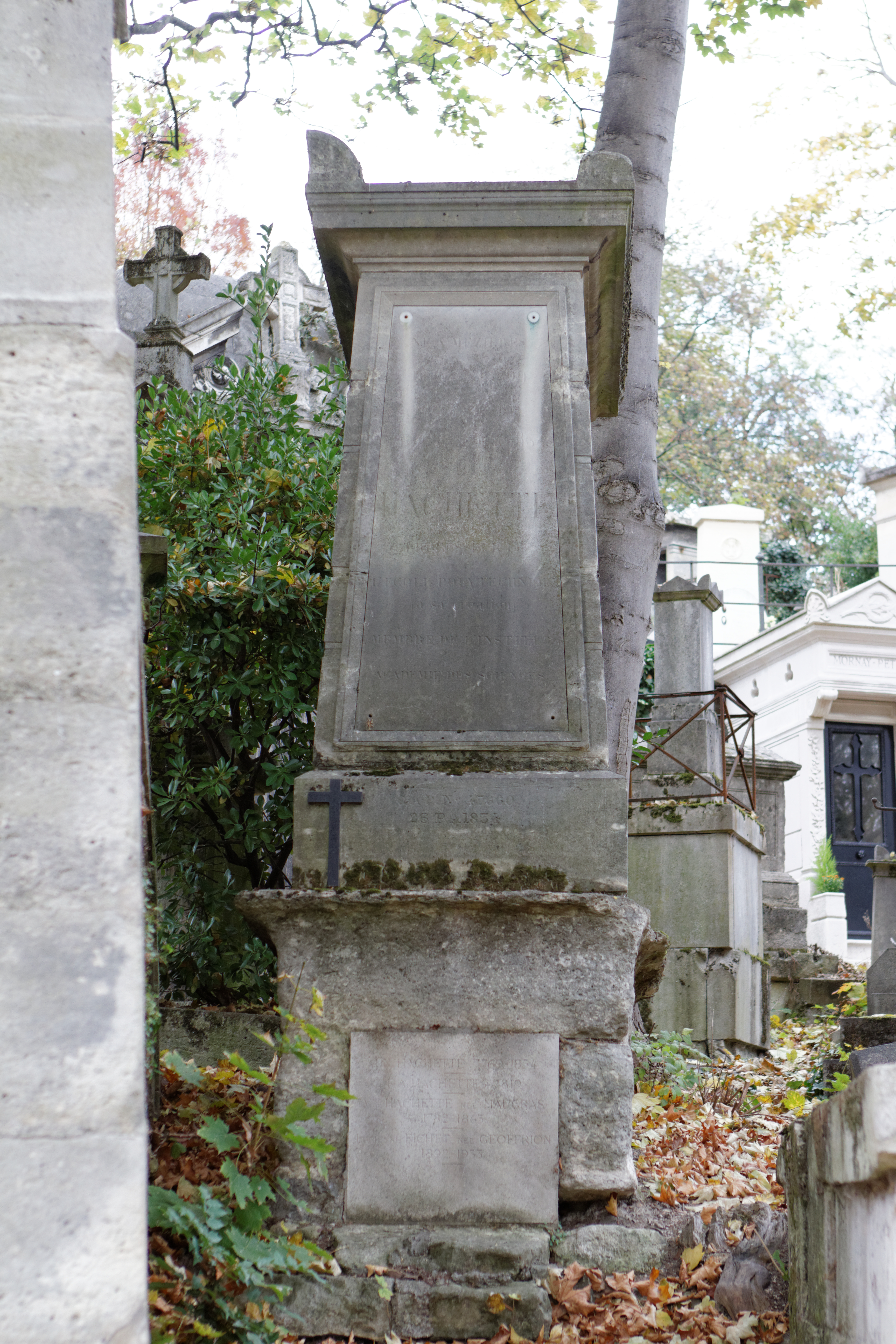 Sépulture de Jean-Nicolas-Pierre Hachette (1769-1834), mathématicien.